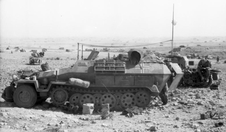 1.6.1942 Nach der Schlacht bei Sidi Mustah [...] Auf Höhen von Sidi-Mustah südwestlich von Tobruk